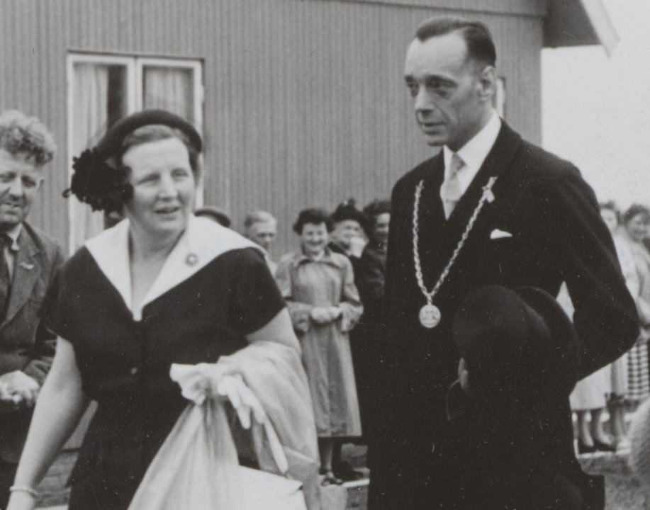 Collectie / Archief : Fotocollectie Elsevier Reportage / Serie : [ onbekend ] Beschrijving : koninklijk huis, koninginnen, bezoeken, overstromingen, eengezinswoningen, burgemeesters, Bolman Th.W., Juliana, koningin Datum : 21 juni 1954 Locatie : Strijen, Zuid-Holland Trefwoorden : bezoeken, burgemeesters, eengezinswoningen, koninginnen, koninklijk huis, overstromingen Persoonsnaam : Bolman Th.W., Juliana, koningin Fotograaf : Fotograaf Onbekend / Anefo Auteursrechthebbende : Nationaal Archief Materiaalsoort : Foto (zwart/wit) Nummer archiefinventaris : bekijk toegang 2.24.05.02 Bestanddeelnummer : 014-1338